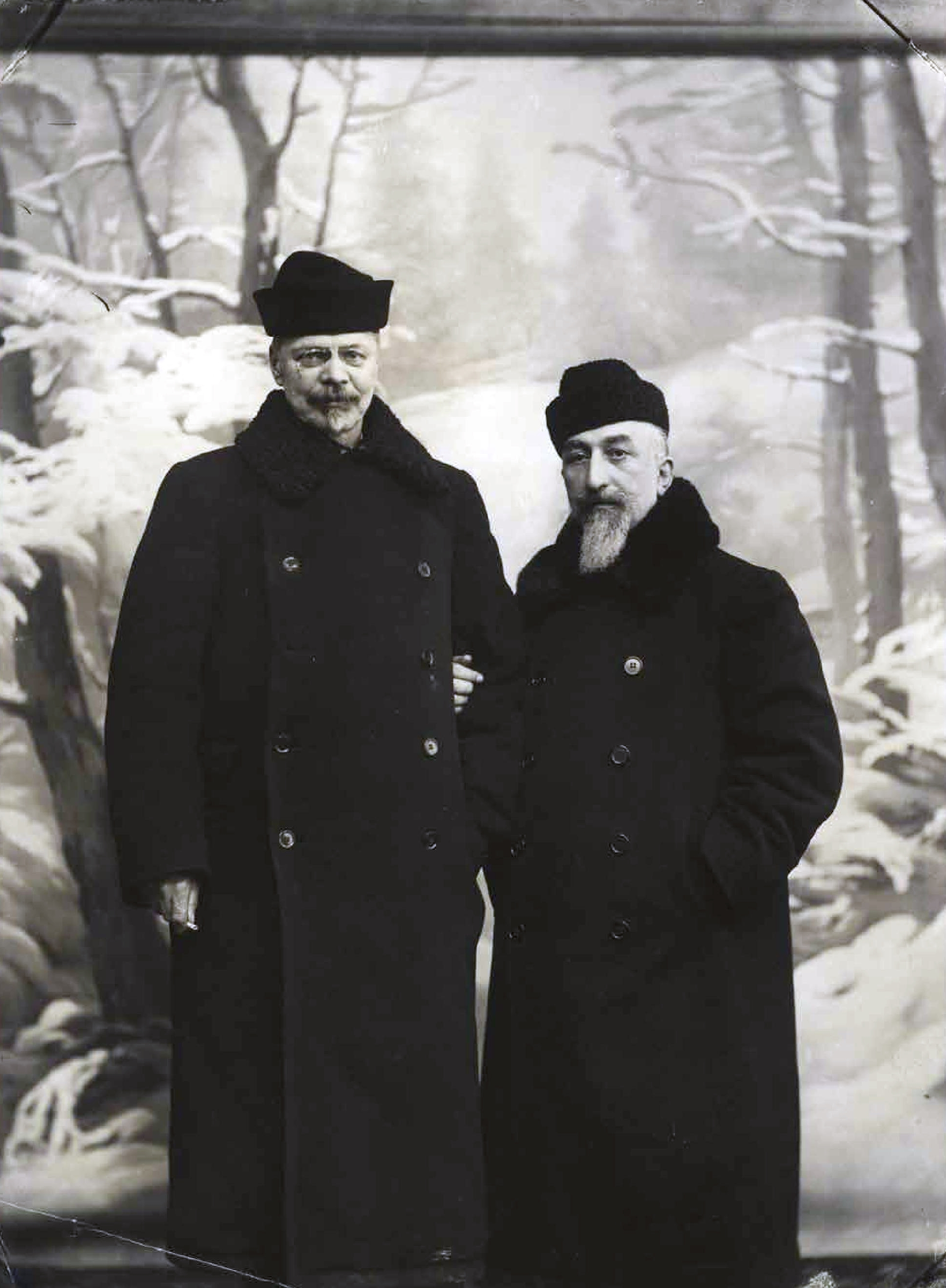 Депутаты III Государственной Думы: Фёдор Измайлович Родичев (слева) и Александр Никифорович Лихачёв (справа)